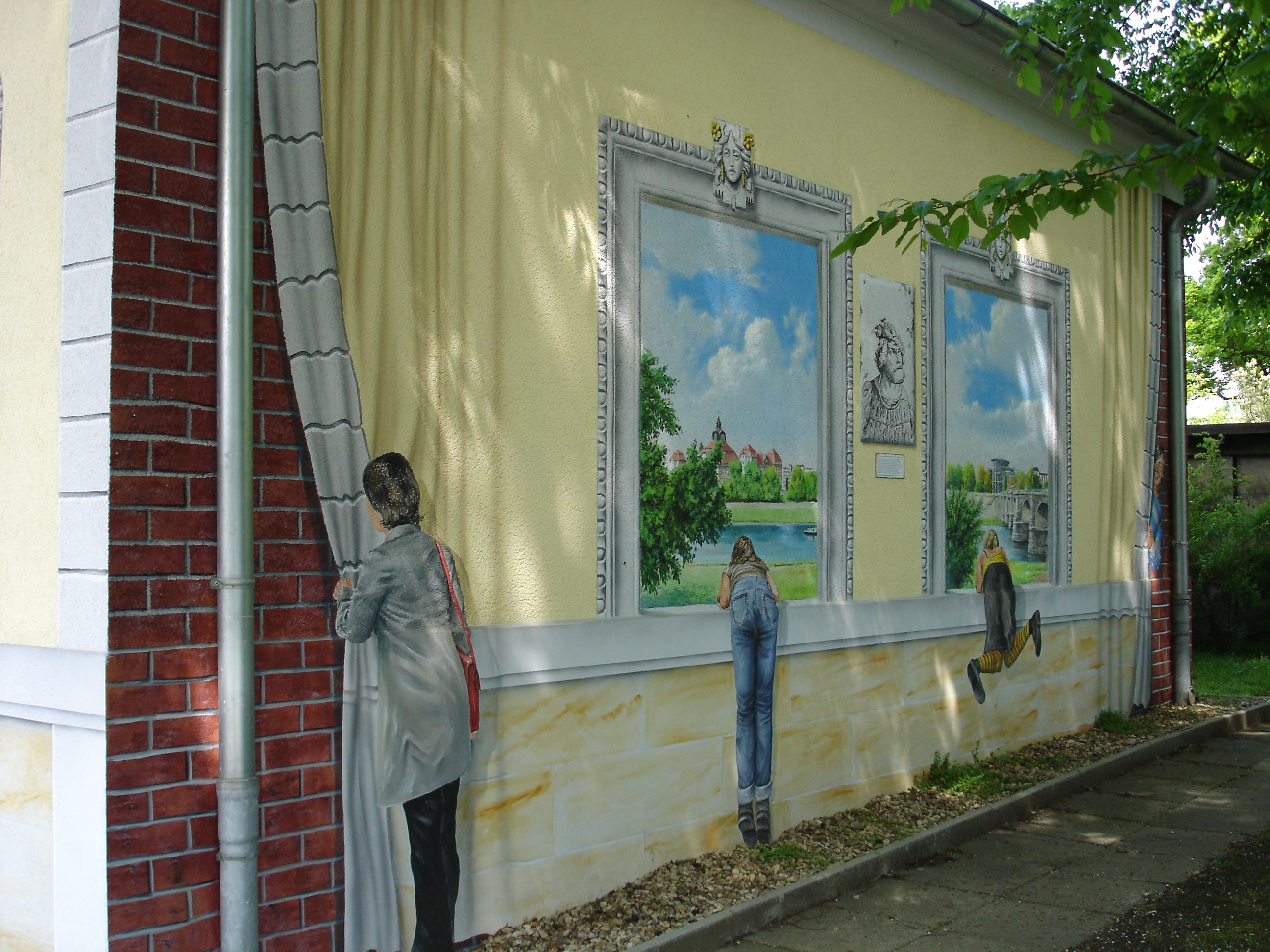 Dresden: Grafitto als Fassadengestaltung eines Transformatorenhäuschens der DREWAG am Sachsenplatz